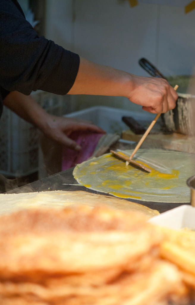 Jianbing being prepared: 煎饼果子 (Jianbing guozi)